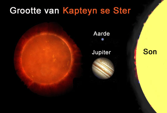 Die grootte van Kapteyn se Ster